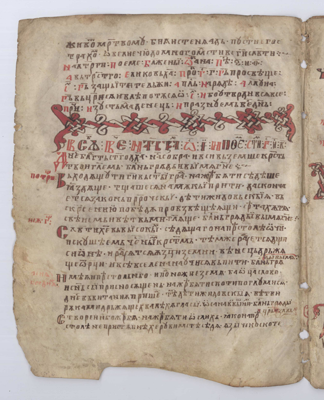 Триод постен и цветен (Аргиров триод)